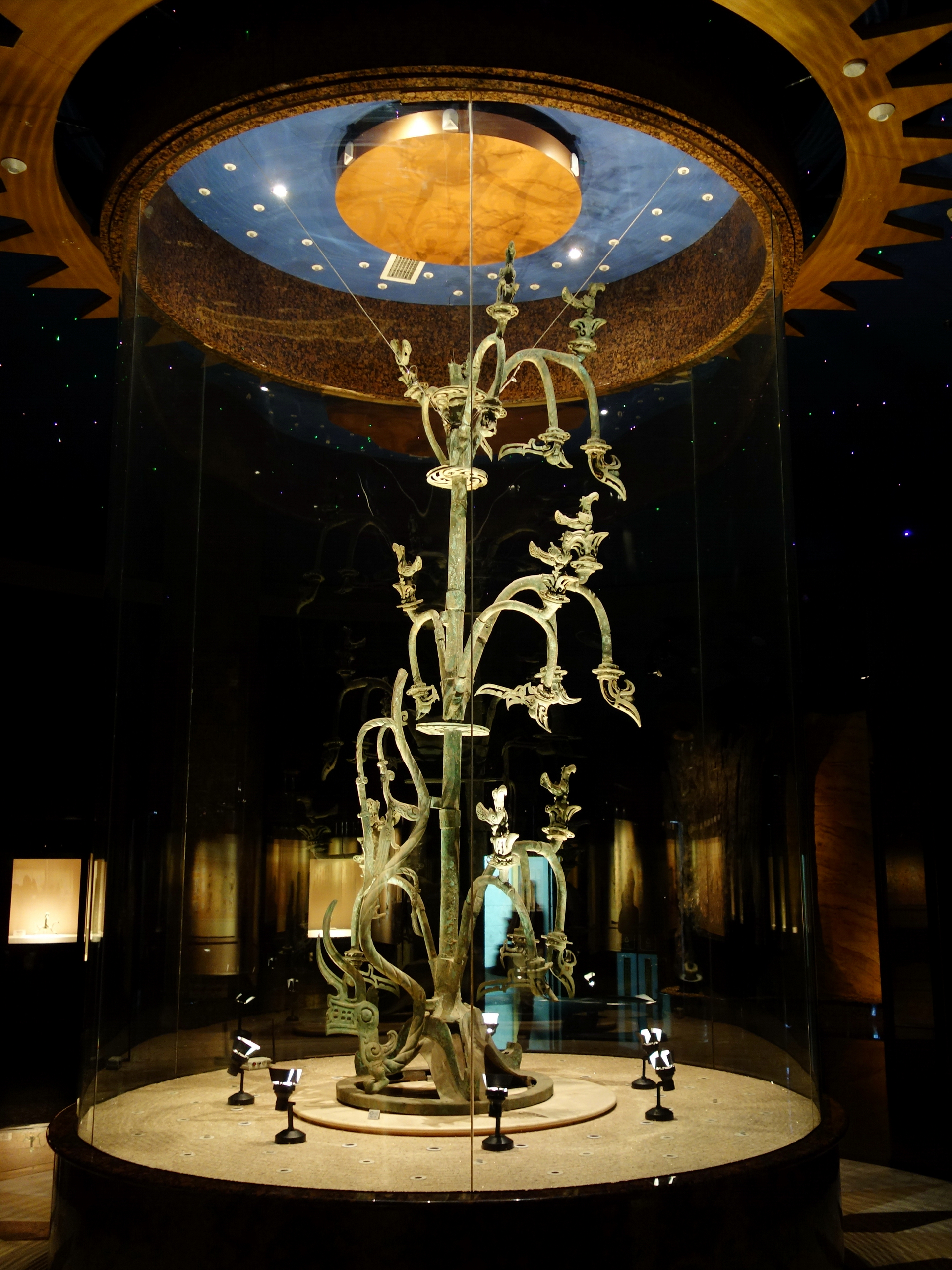 Ⅰ号大型青铜神树，三星堆遗址二号祭祀坑出土，由底座、树和龙三部分组成，通高3.96米，铜树顶部及龙身后段残缺。是国家文物局规定首批禁止出国（境）展览文物之一。